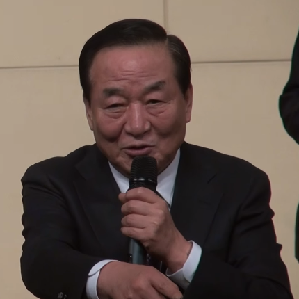 Star연예인 시민봉사단 발대식에서 격려사를 하는 서청원의 모습